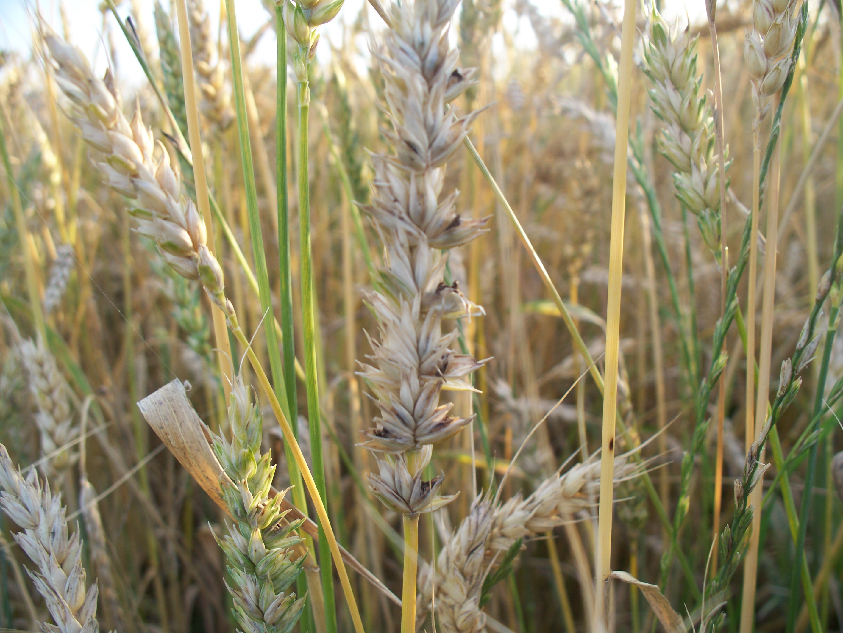 Śnięć cuchnąca pszenicy, zaatakowane niektóre kłoski.